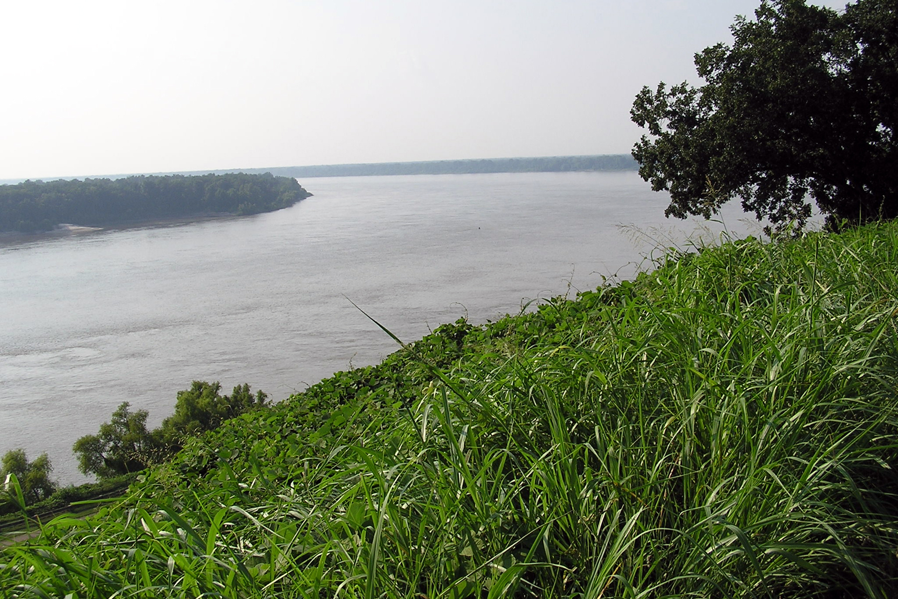 Vicksburg: Mississippi River in Vicksburg